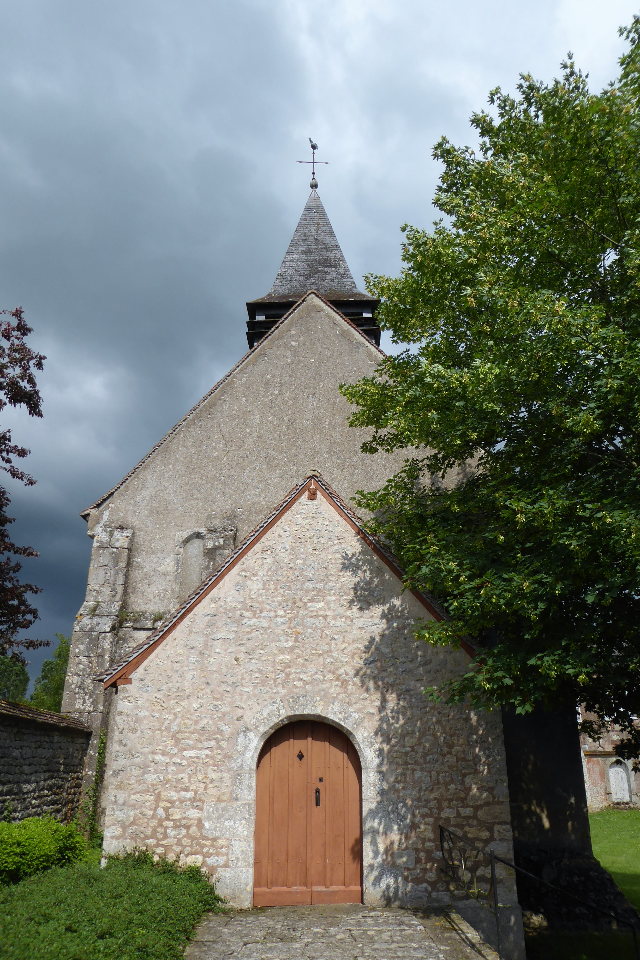 porche d'entrée de l'église Notre-Dame, Villars, Eure-et-Loir, France.